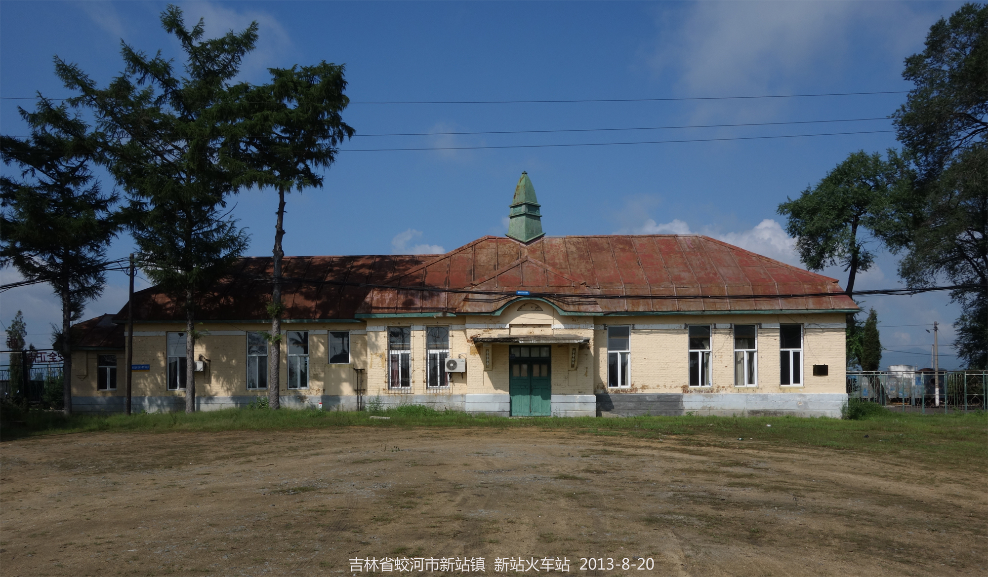 建于1936年的新站火车站----候车室